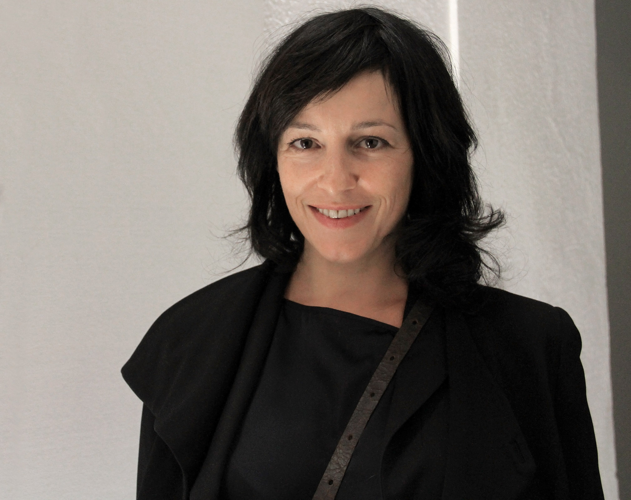 Julia Cencig beim Nestroy-Theaterpreis 2012 im MuseumsQuartier in Wien.